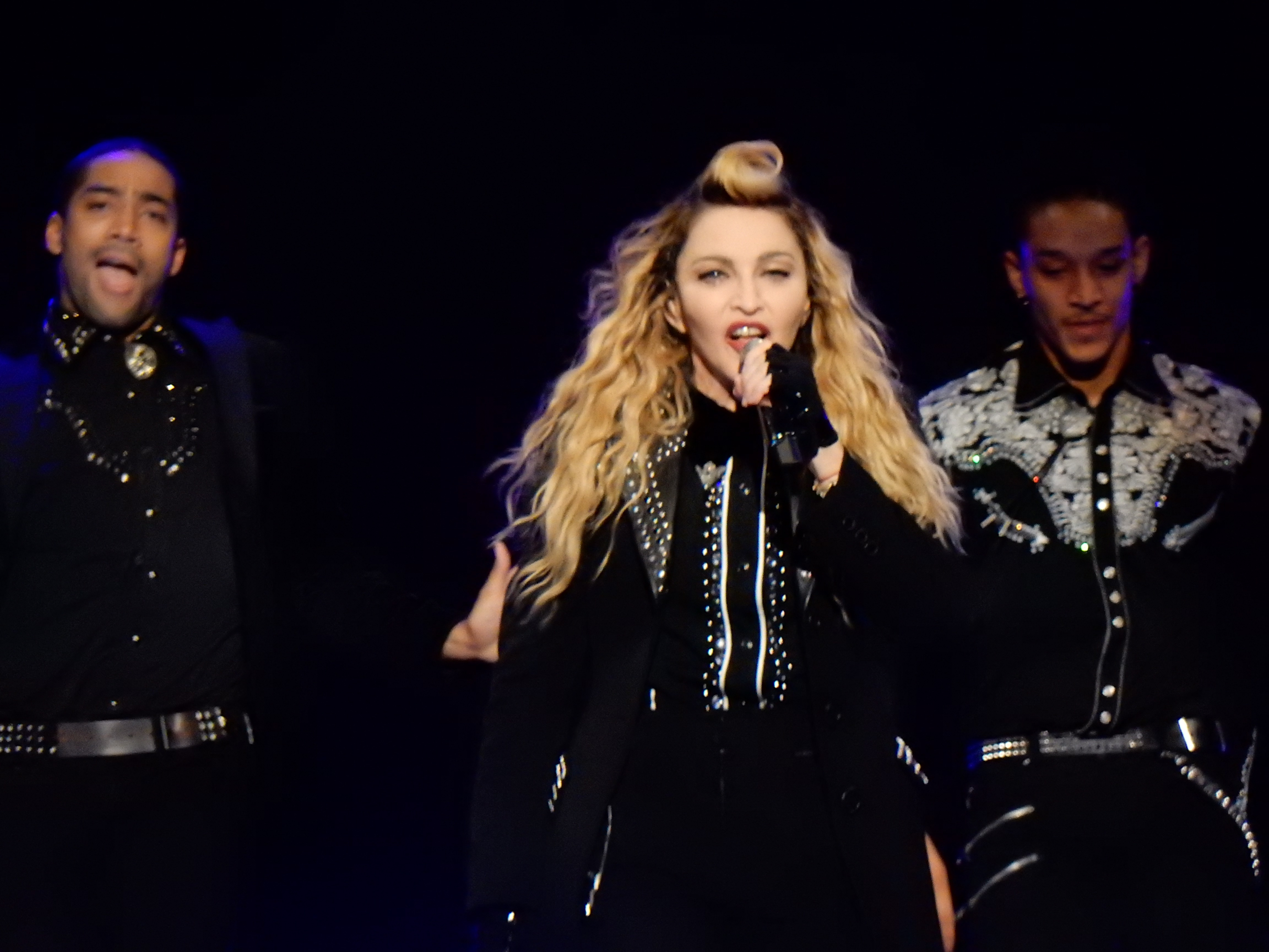 Madonna Rebel Heart Tour 2015 - Stockholm